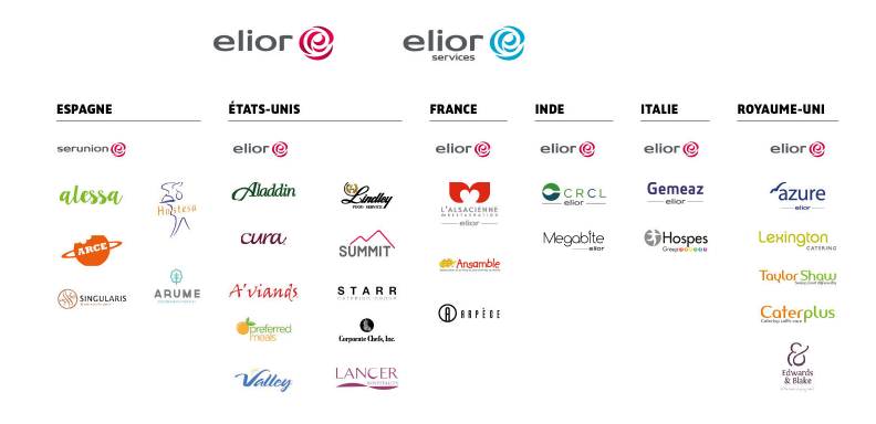 Les marques d'Elior Group